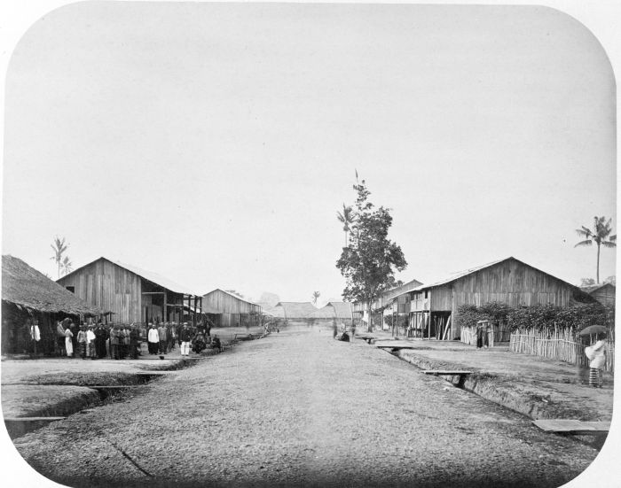 Foto. Het Chinese kamp te Penajoeng in Atjeh